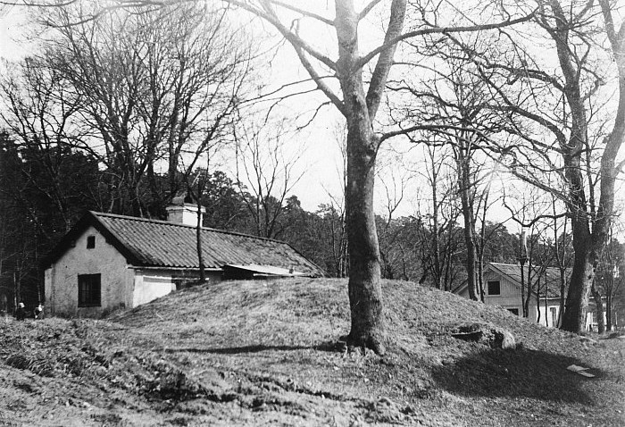 Mellanjärva gård med Fiskarstugan och Kungshögen